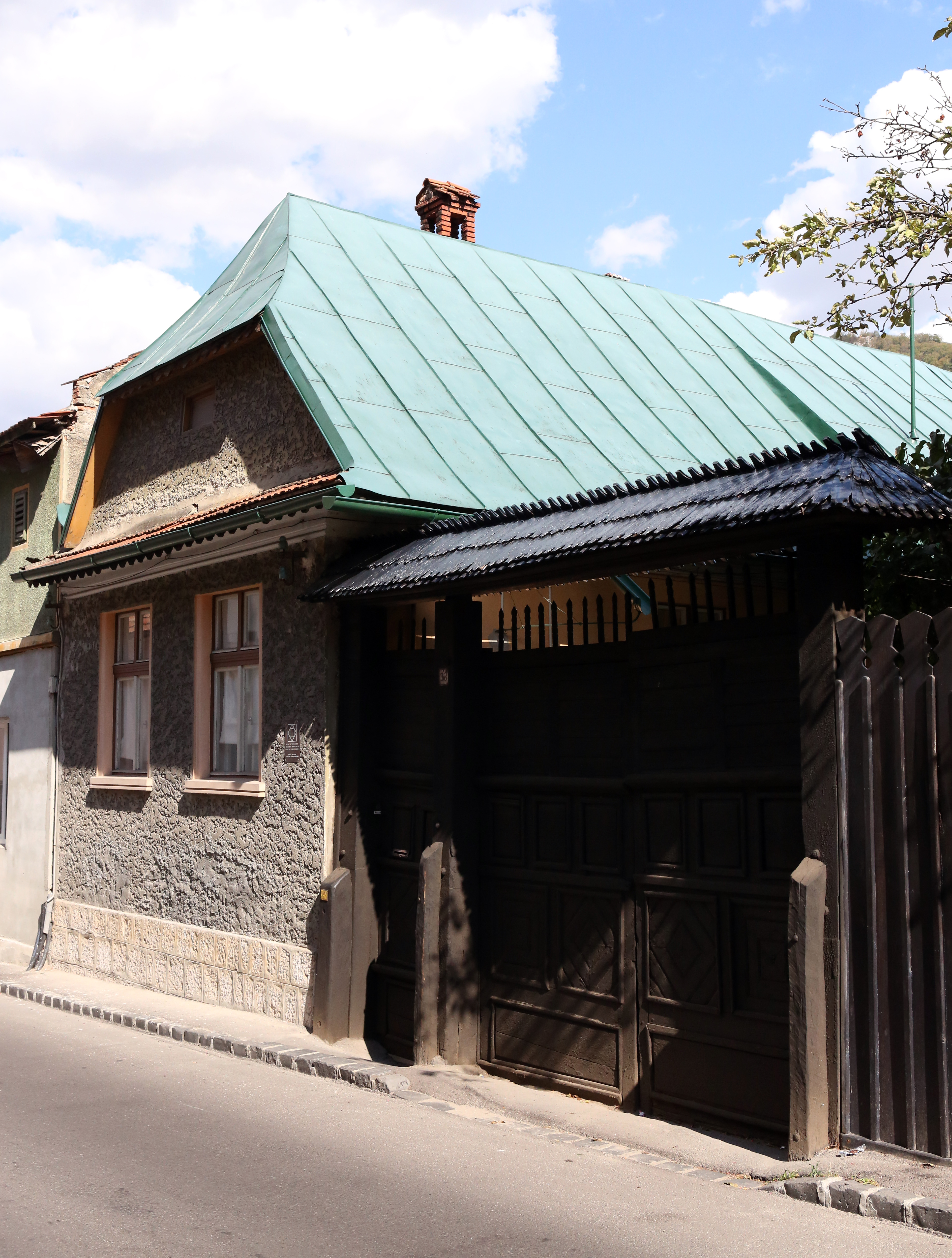 Casă și poartă de lemn